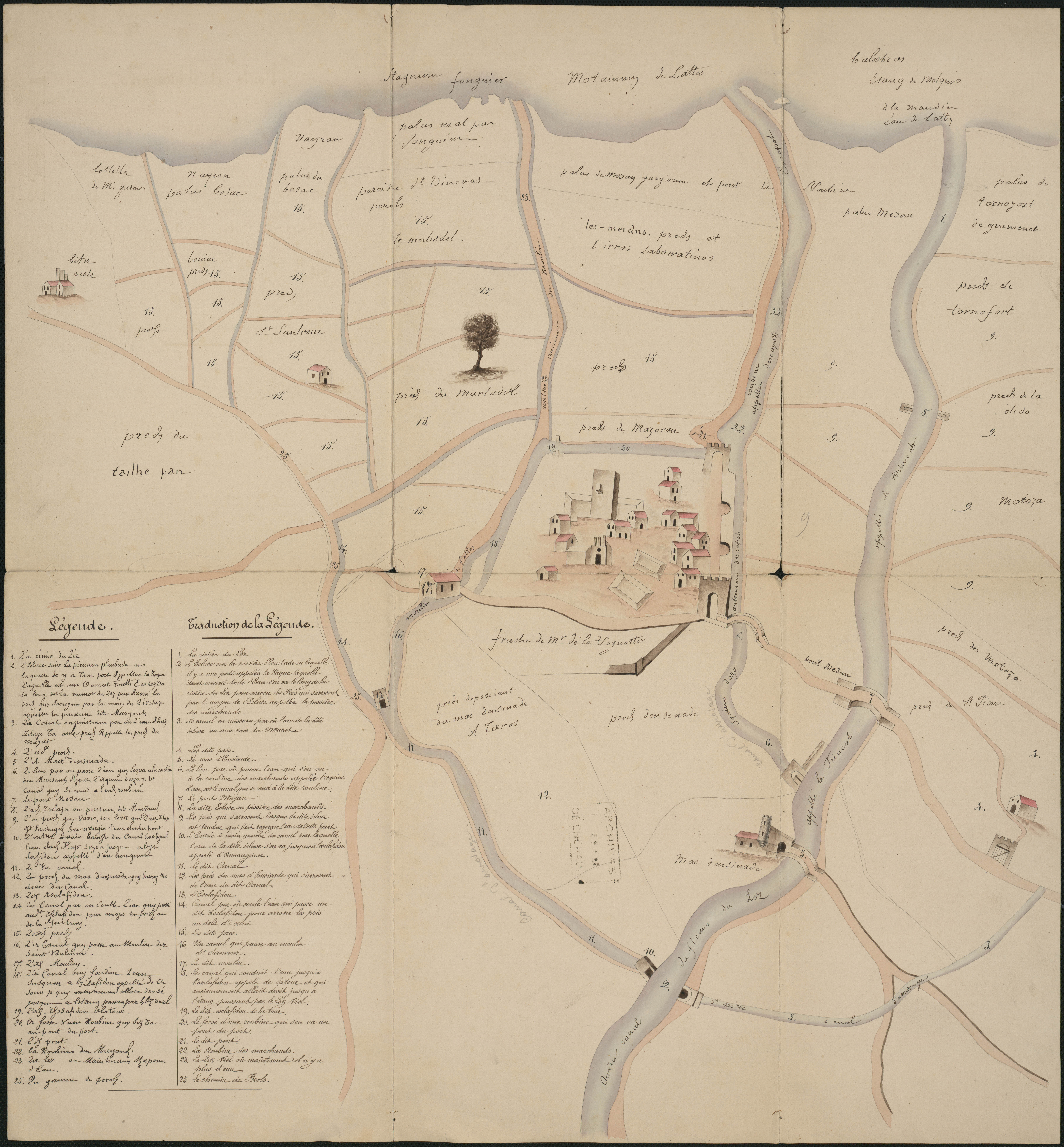 Copie du plan que l'on suppose du XVIe siècle dans tous les cas antérieur à la concession du Canal du Lez en 1666. Pourvoi du sieur de Grave, rivière canalisée du Lez